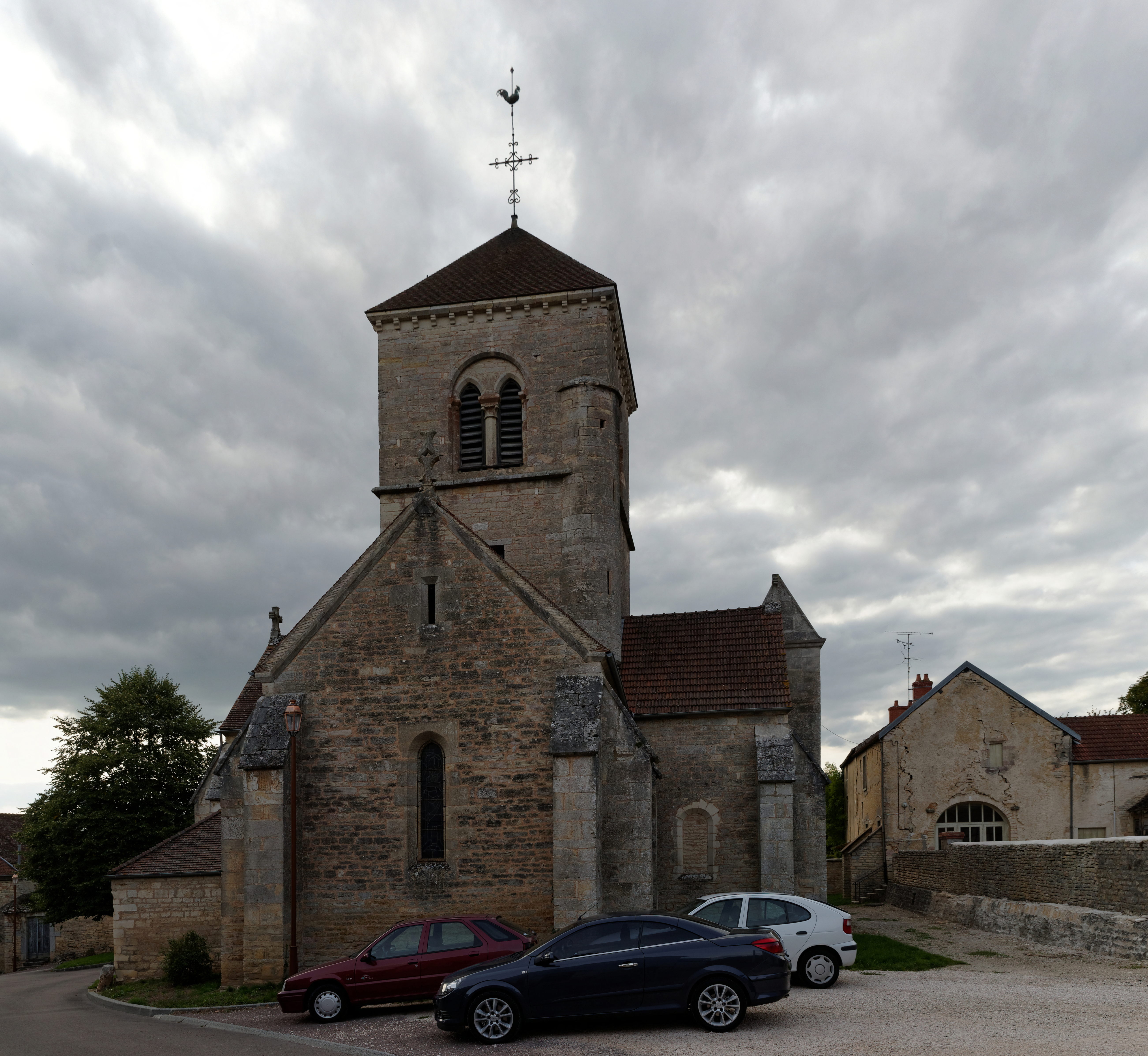 Église Saint-Jean-Baptiste (Fleurey-sur-Ouche, Côte d'Or, Bourgogne, France) .